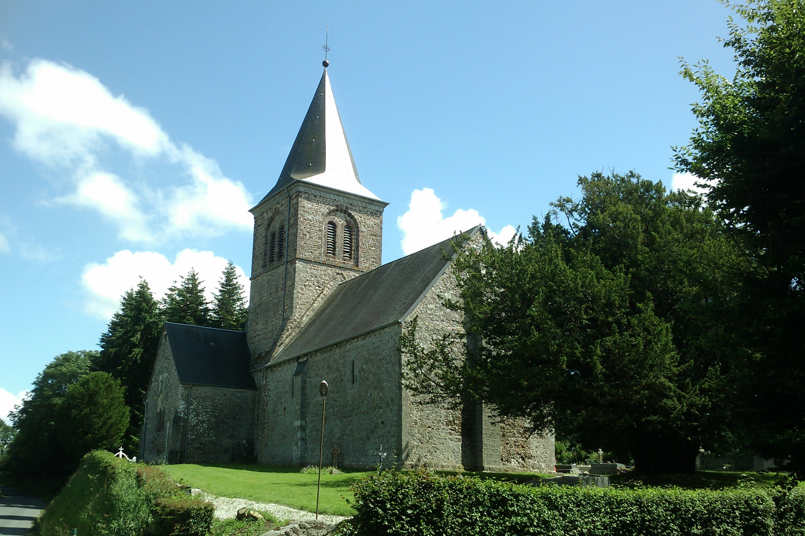 Église Saint-Pierre du Mesnil-Aubert église du XIIIe siècle, en grande partie romane avec de remarquables peintures murales .